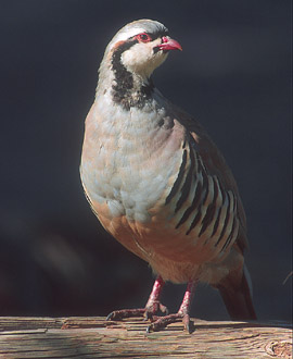 kişisel resim: Kınalı keklik - Alectoris chukar